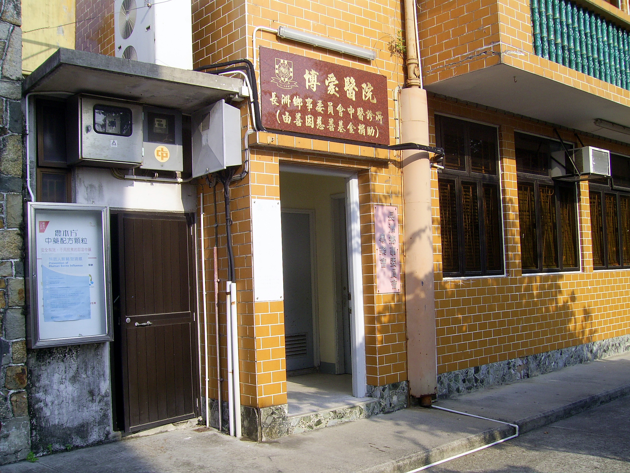 中文（香港）: 博愛醫院長洲鄉事委員會綜合中醫專科診所